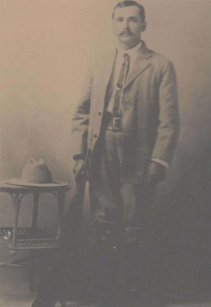 General Esteban Baca Calderón